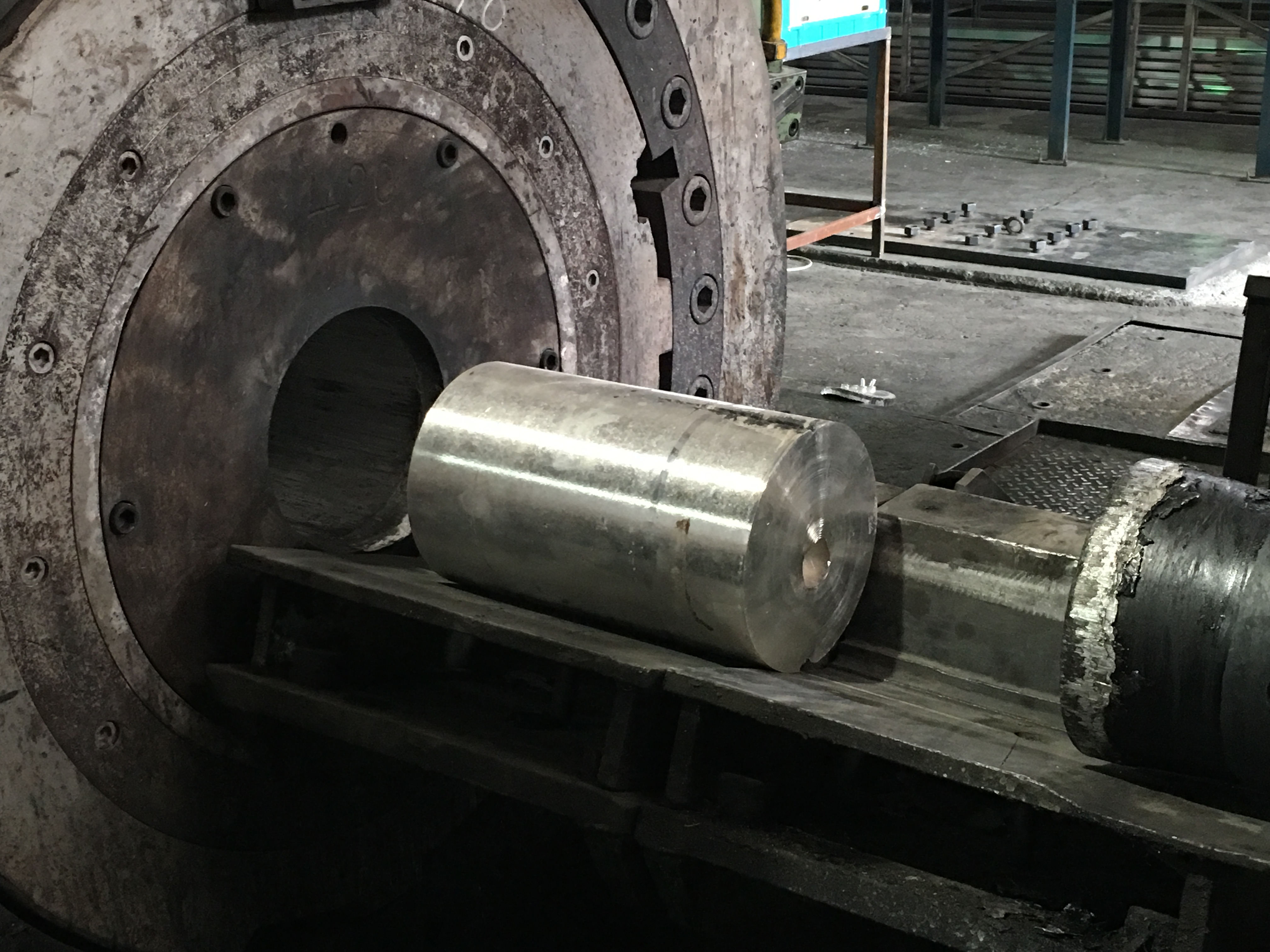 بیلت اولیه و پرس اکستروژن